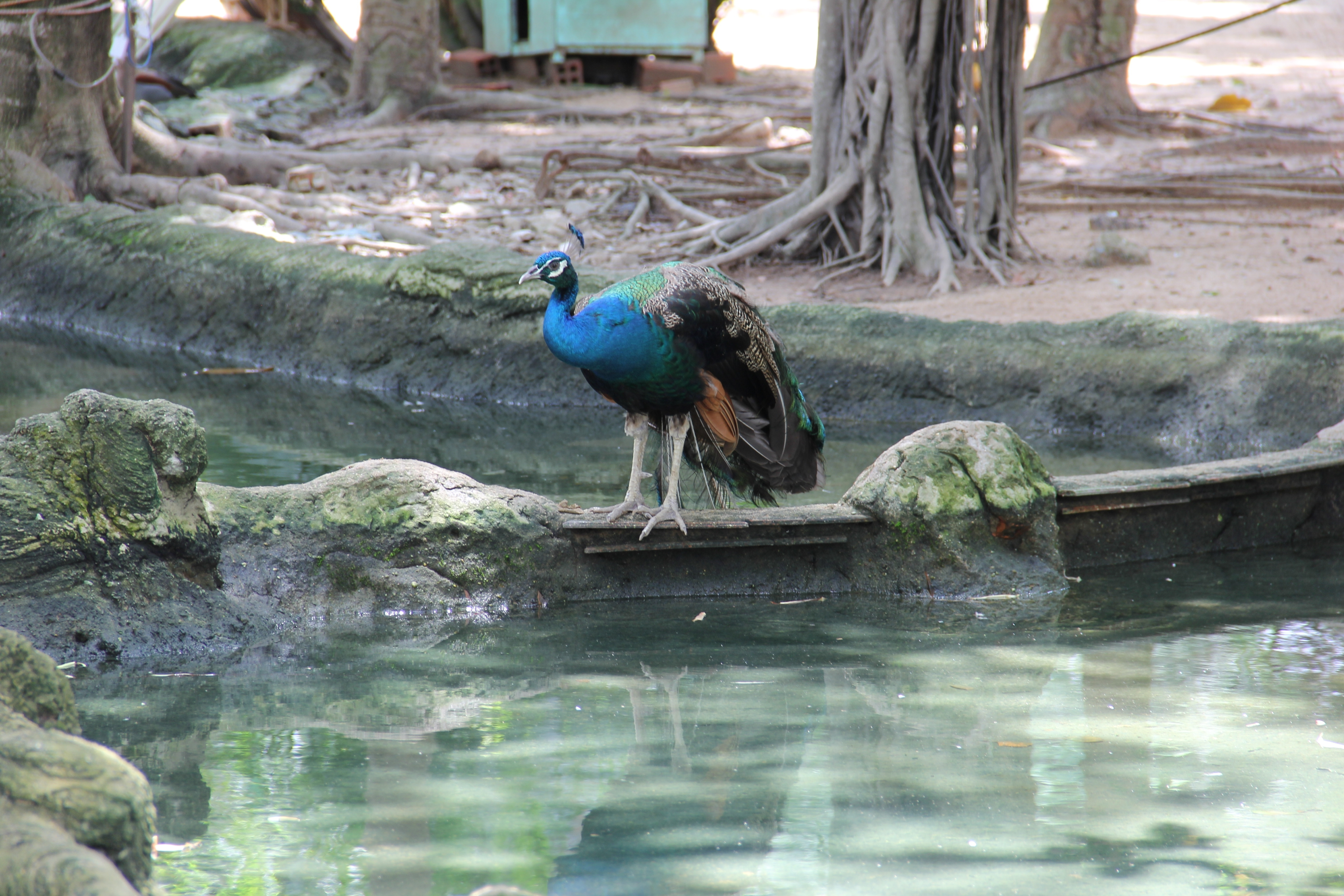 Hình tự chụp bằng máy kỷ thuật số về một con công xanh Việt Nam tại khu du lịch Đại Nam